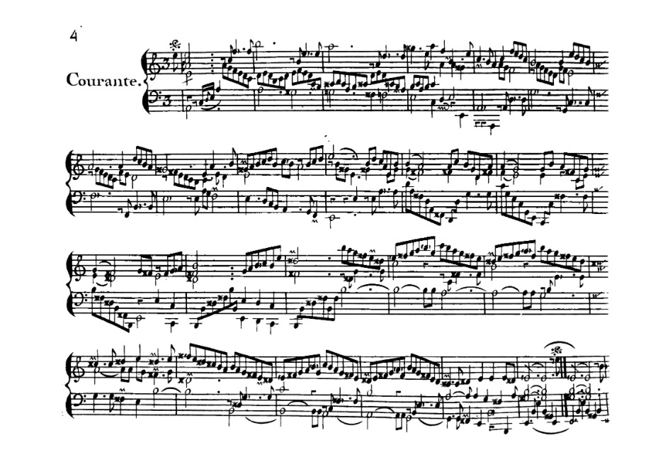 Nouvelles suites de pièces de clavecin (impression en 1727) Courante